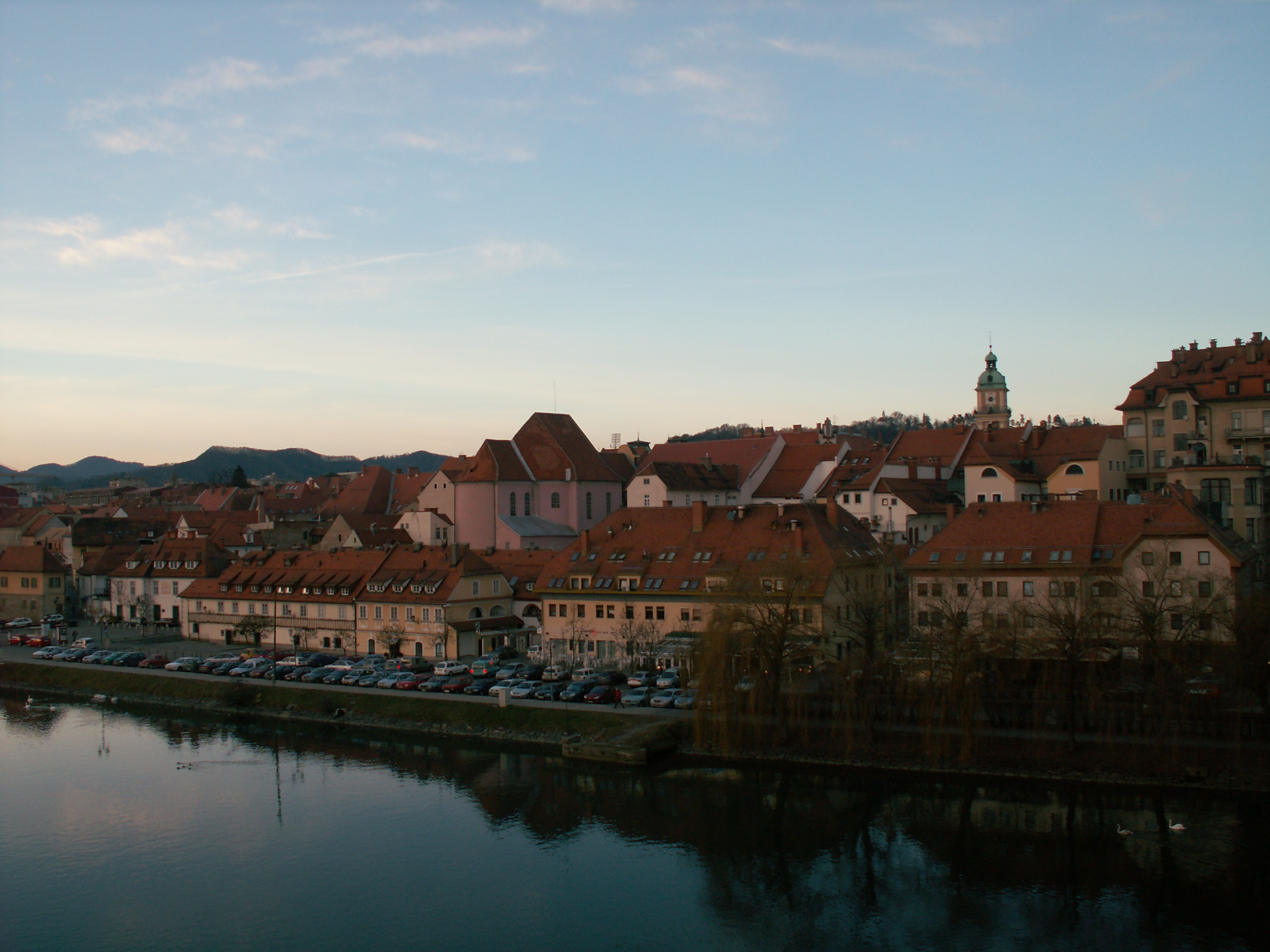 Nabrzeże rzeki Lent